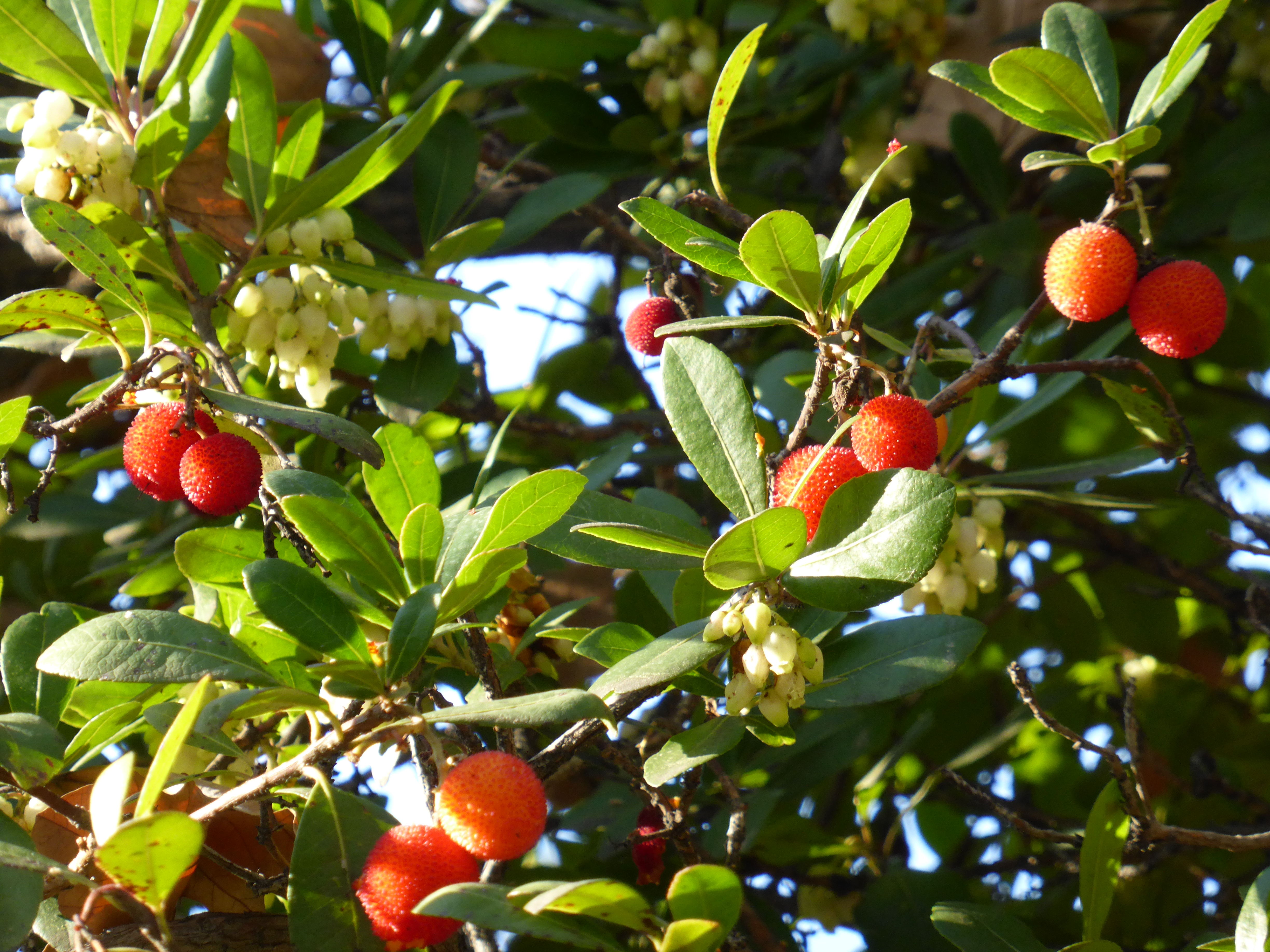 El arbusto conocido como "madroño" forma parte del escudo de Madrid, junto con un oso. La fotografía es un detalle del arbusto, con flores y frutos.